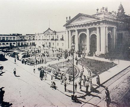 Antigua ubicacion de la Universidad de Guadalajara